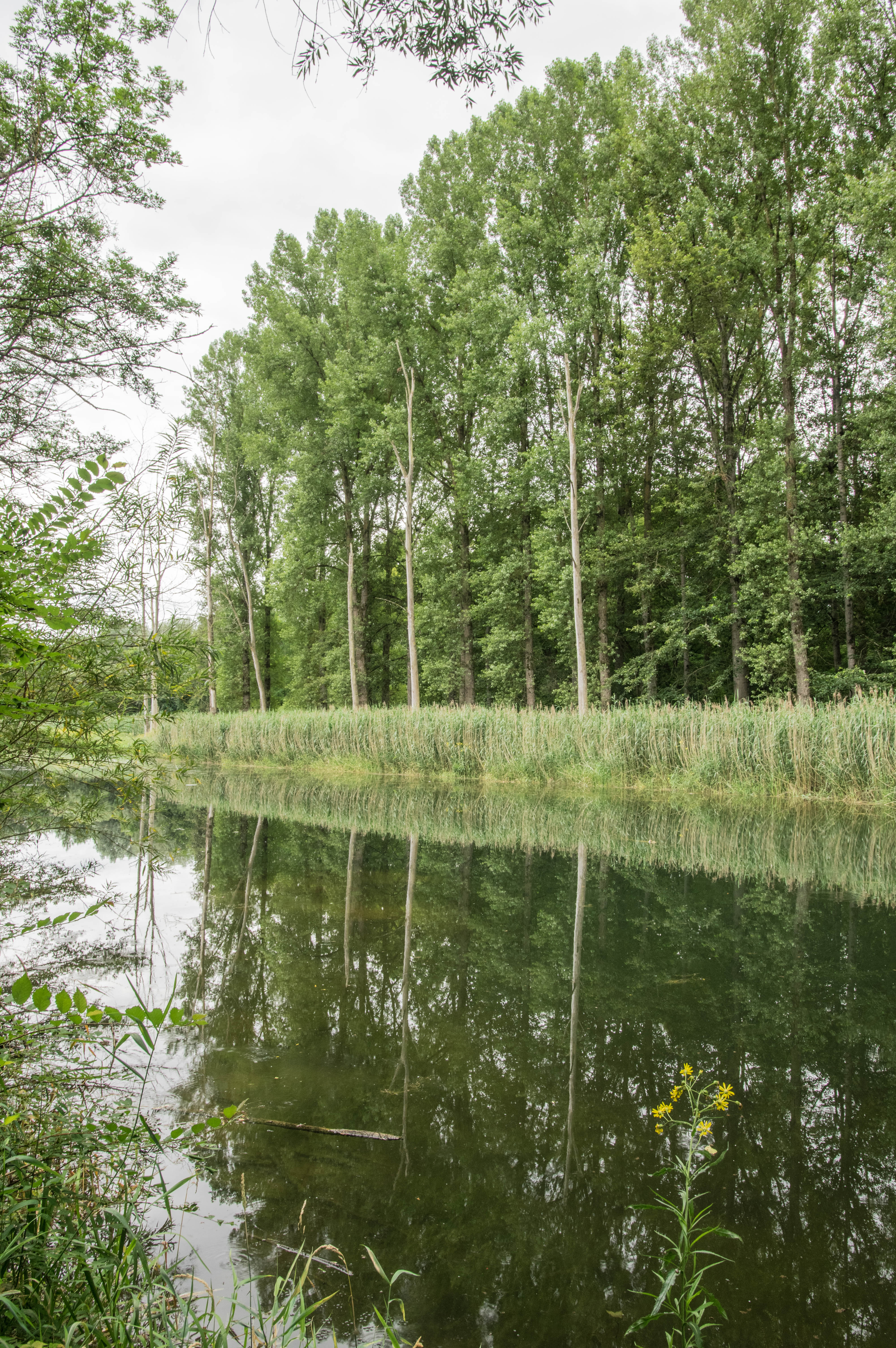 Blick von Nordwesten gegen die schmale mit Auwald bestandene Landzunge zwischen Altwasser und der kanalisierten Donau; Baumbestand teilweise weit höher als 25 m. Naturdenkmal ND-6601